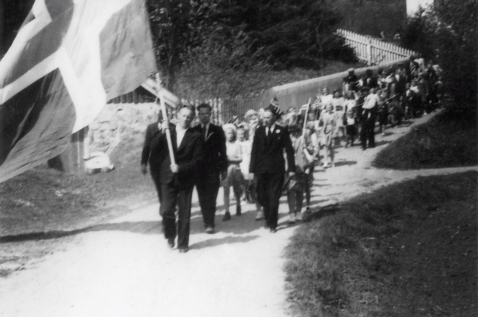 17. mai-tog i svingen rett nedenfor Vigmostad Kirke. Flaggbærer Karl Johan Tryland. Sverre Aukland foran til høyre.